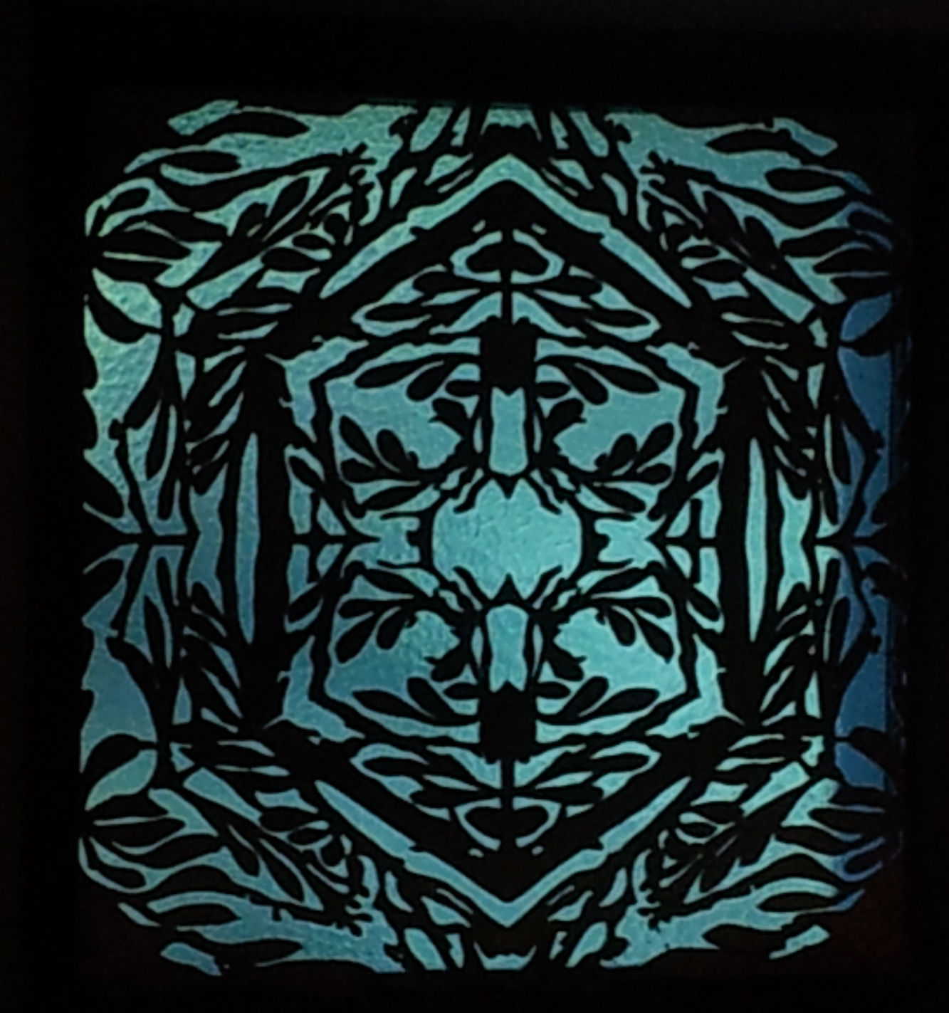 Glasbild von Martin Freyer in der Albert-Schweitzer-Schule (zerstört), Hilden